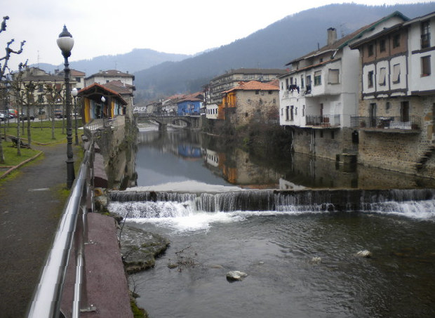 Altube ibaia Orozkoko Zubiaur parean.